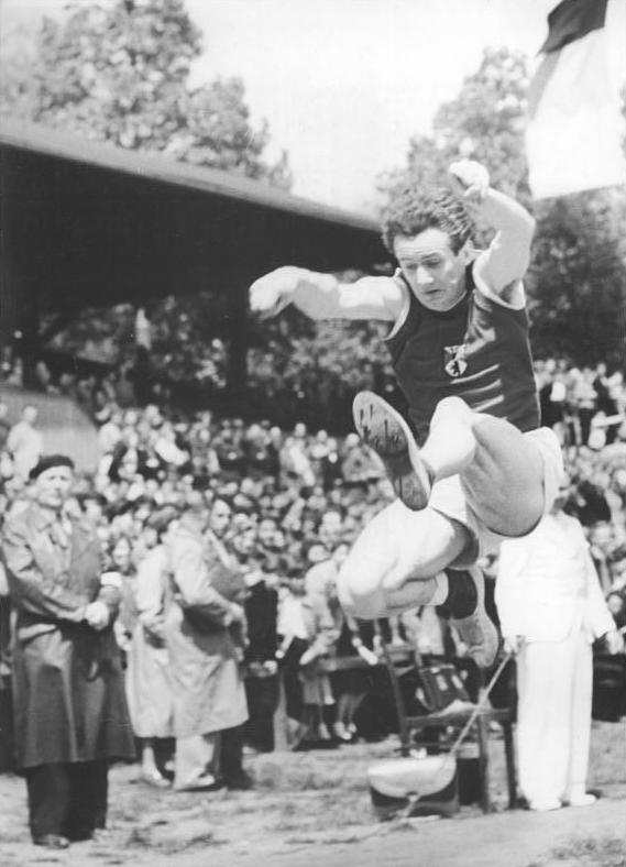 Horst Ihlenfeld Zentralbild TBD-Wlocka 8.6.1955 Leichtathletik-Sportfest in Erfurt. Im Erfurter Georgi-Dimitroff-Stadion fand am 29. und 30.5.1955 ein großes internationales Leichtathletik-Sportfest mit Teilnehmern aus Ungarn, CSR, Polen, Westdeutschland und der DDR statt. UBz: Der Berliner Vertreter vom Sportclub Einheit, Horst Ihlenfeld, beim Weitsprung.